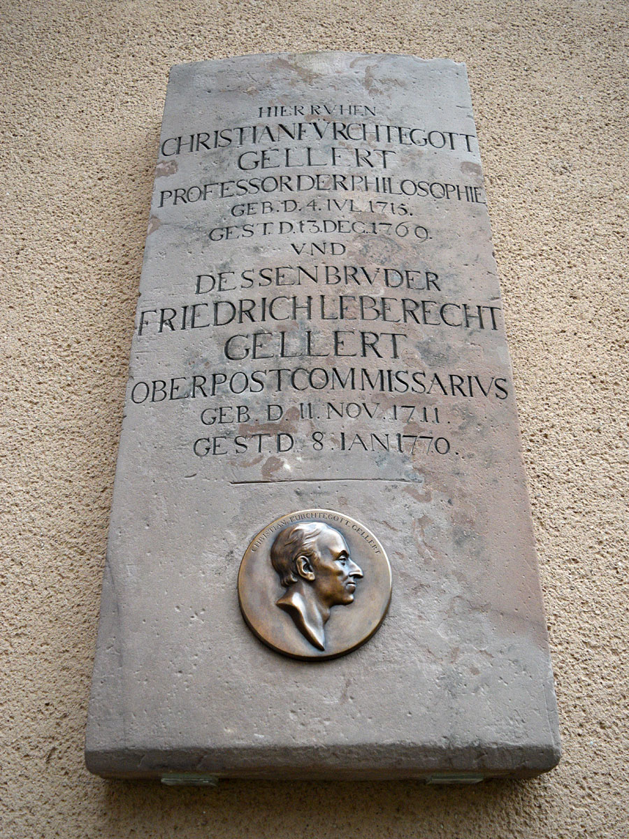 Im Ehrenhof des Grassimuseums: Originale Grabplatte mit Replikat des Gellert-Medaillons durch 3D Scannen, 3D Druck und Bronzeguss © Rapidobject